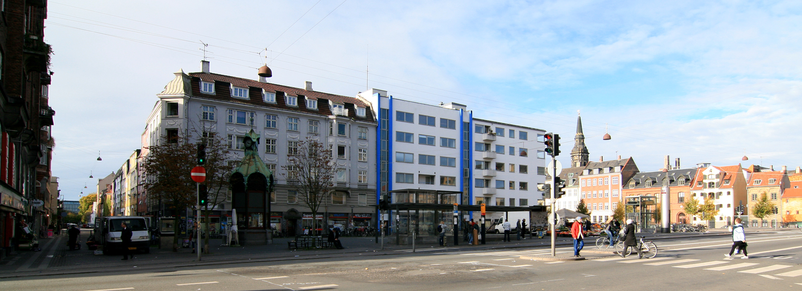 Christianshavns Torv, København.